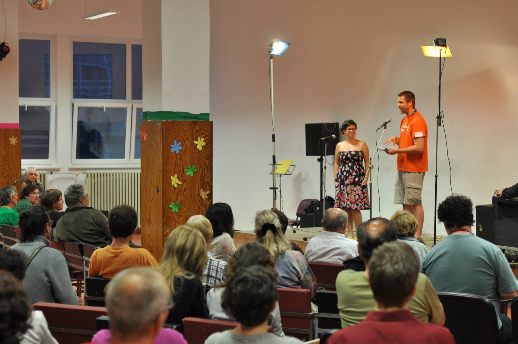 Malfermo de Somera Esperanto-Studado en 2013